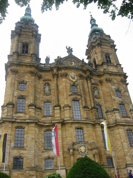 Basilica Vierzehnheiligen